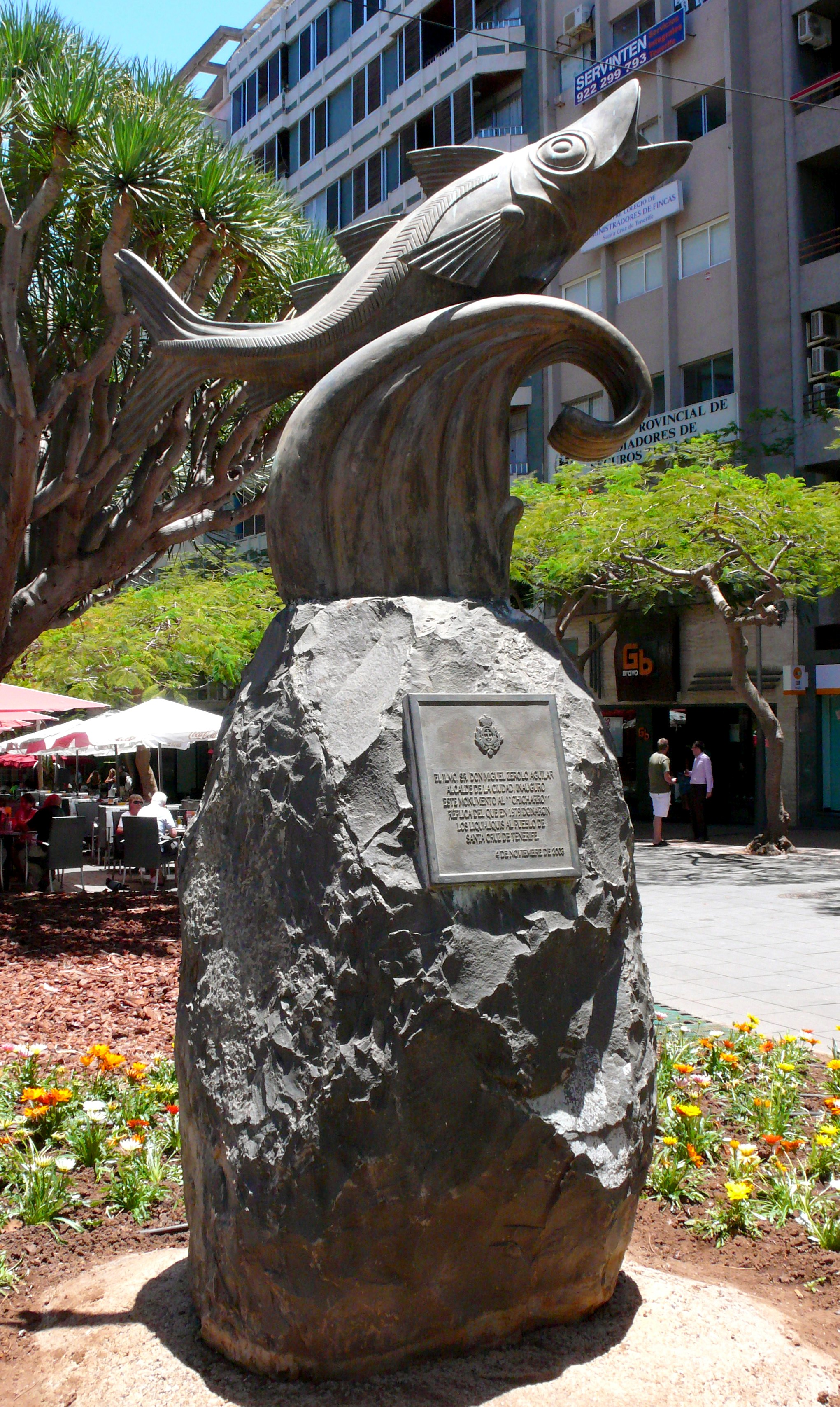 Monumento al Chicharro, escultura en Santa Cruz de Tenerife, Islas Canarias.